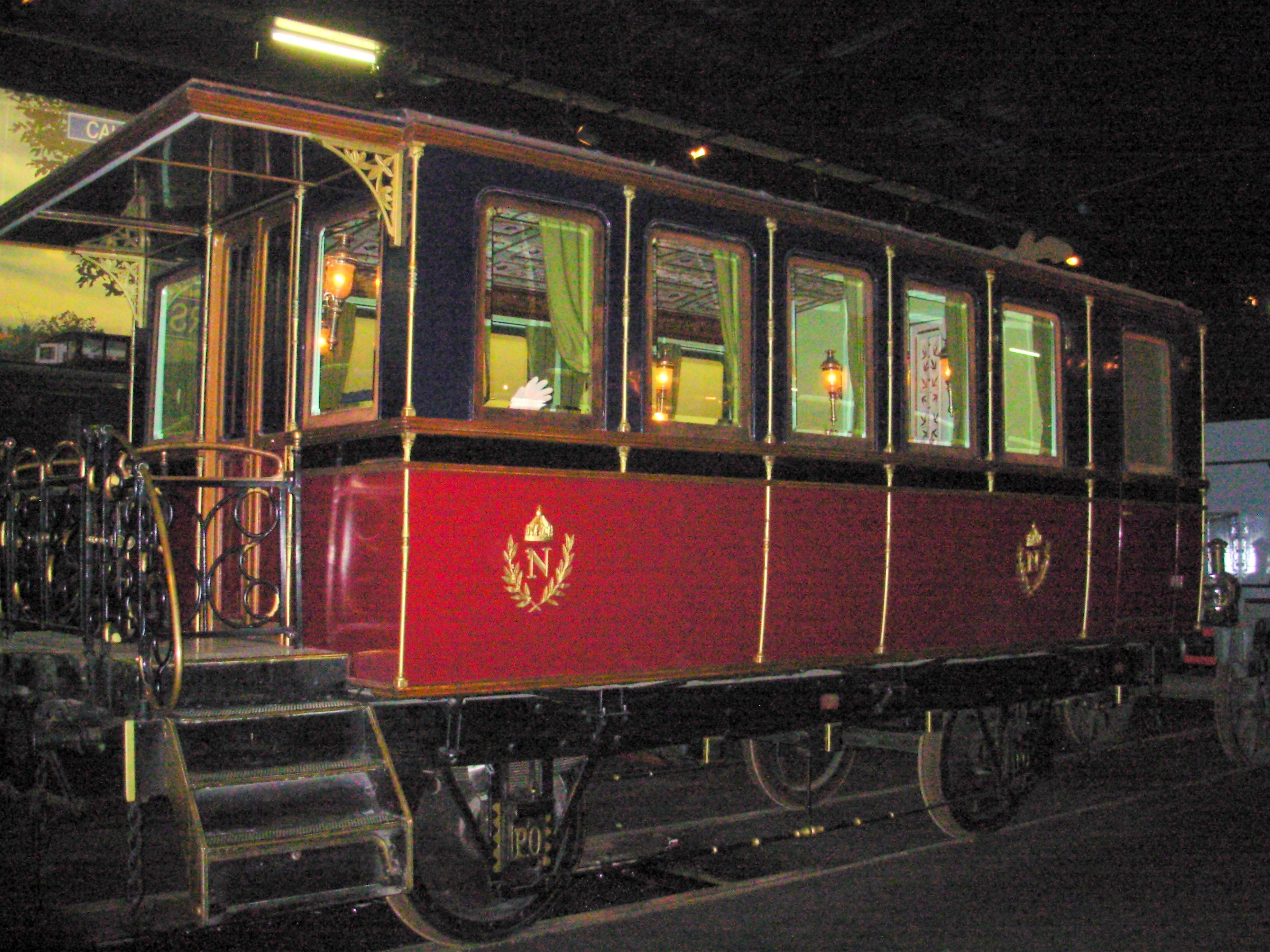 Napoléon III private empire railway car in the French Musée Français du Chemin de Fer in Mulhouse.